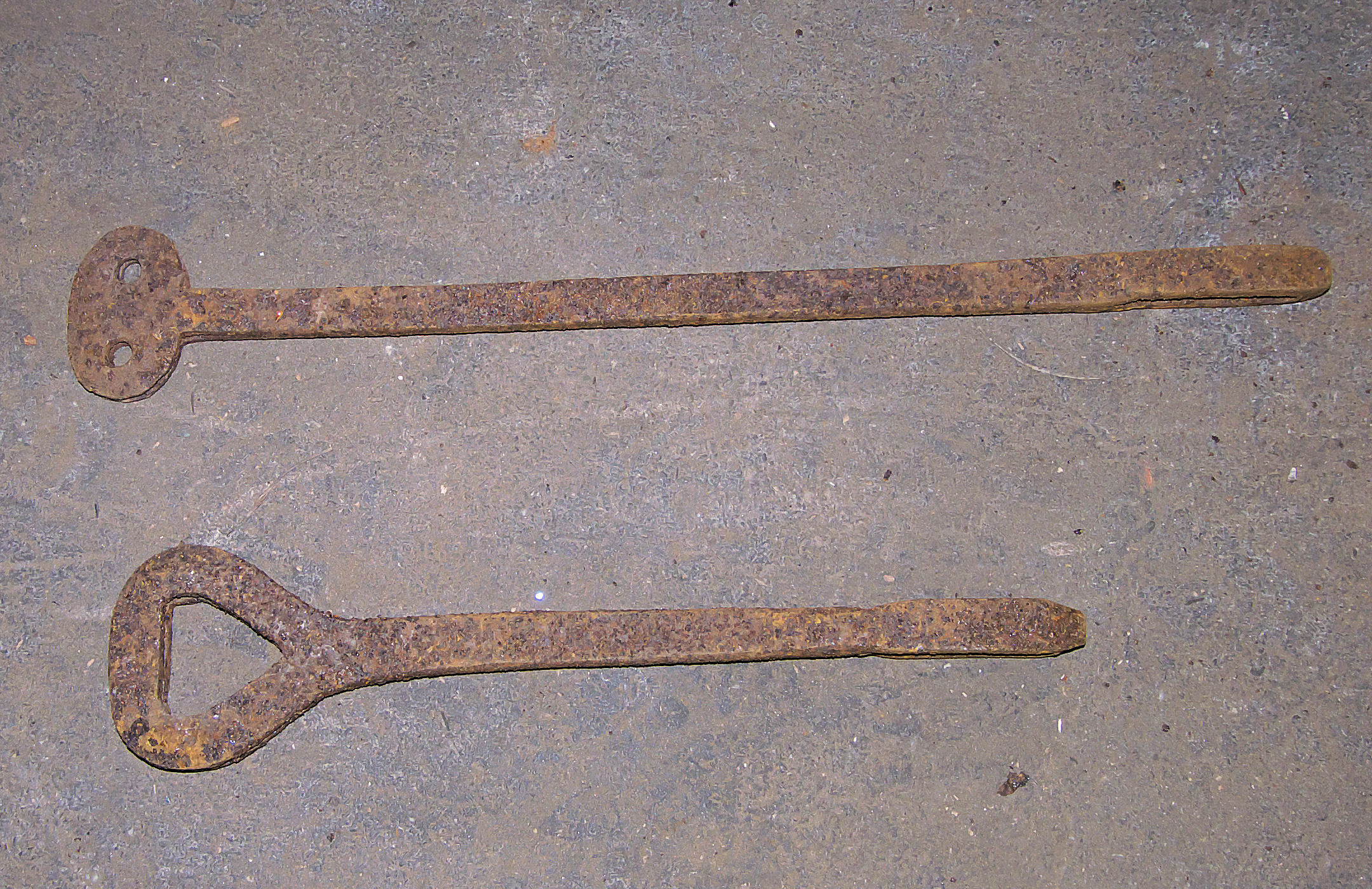 Hengsels voor het spannen van de zagen bij een houtzaagmolen.